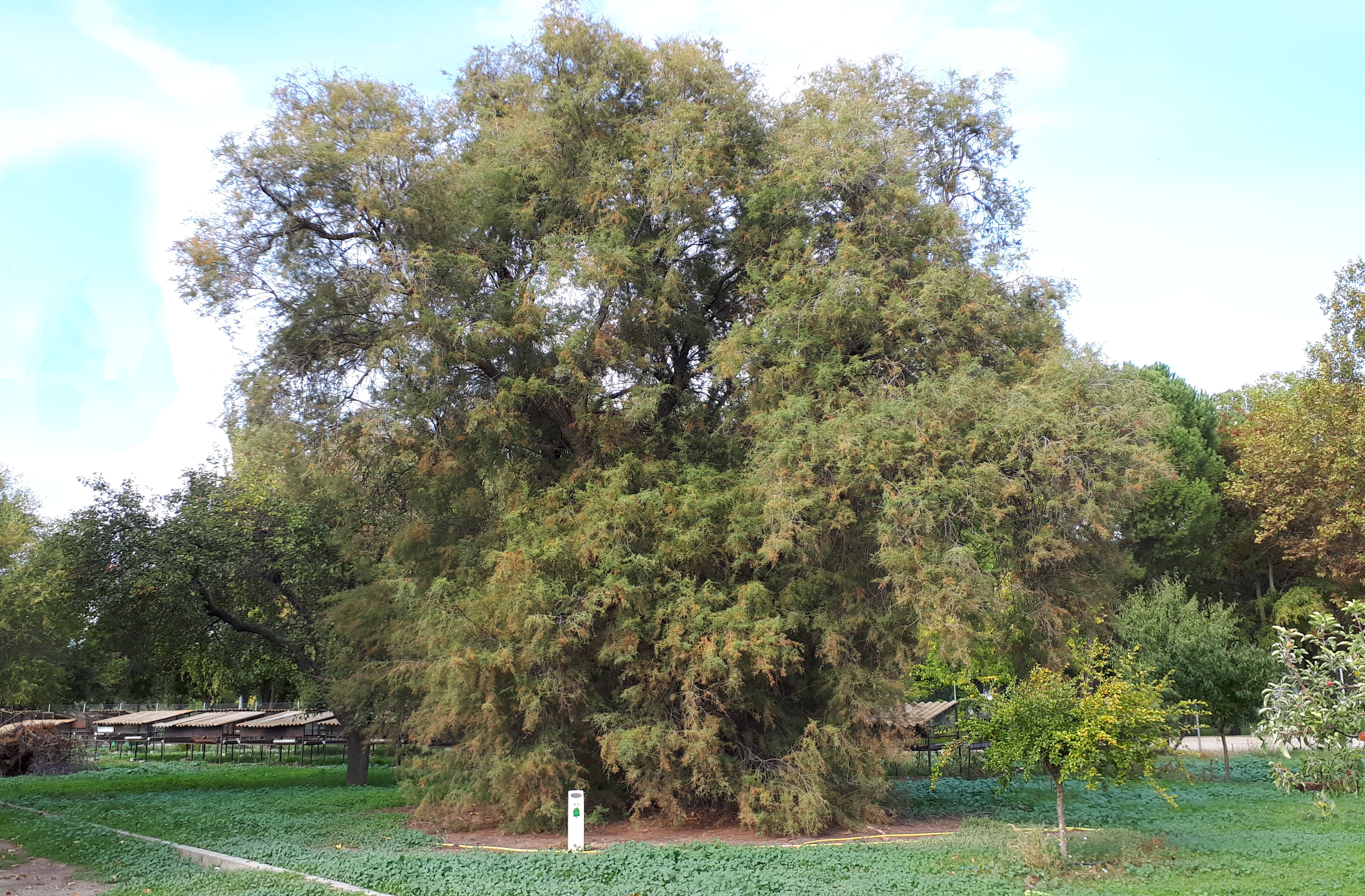 Taray del Gallo en Alcalá de Henares. Tamarix gallica catalogado, desde 2015, como Árbol Singular de la Comunidad de Madrid (España).